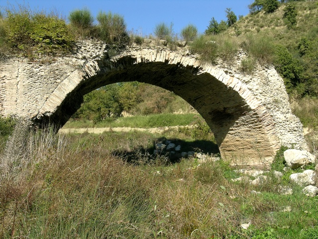 Un'arcata del ponte romano detto "delle chianche", lungo la Via Traiana nei pressi dell'abitato di Buonalbergo (BN).